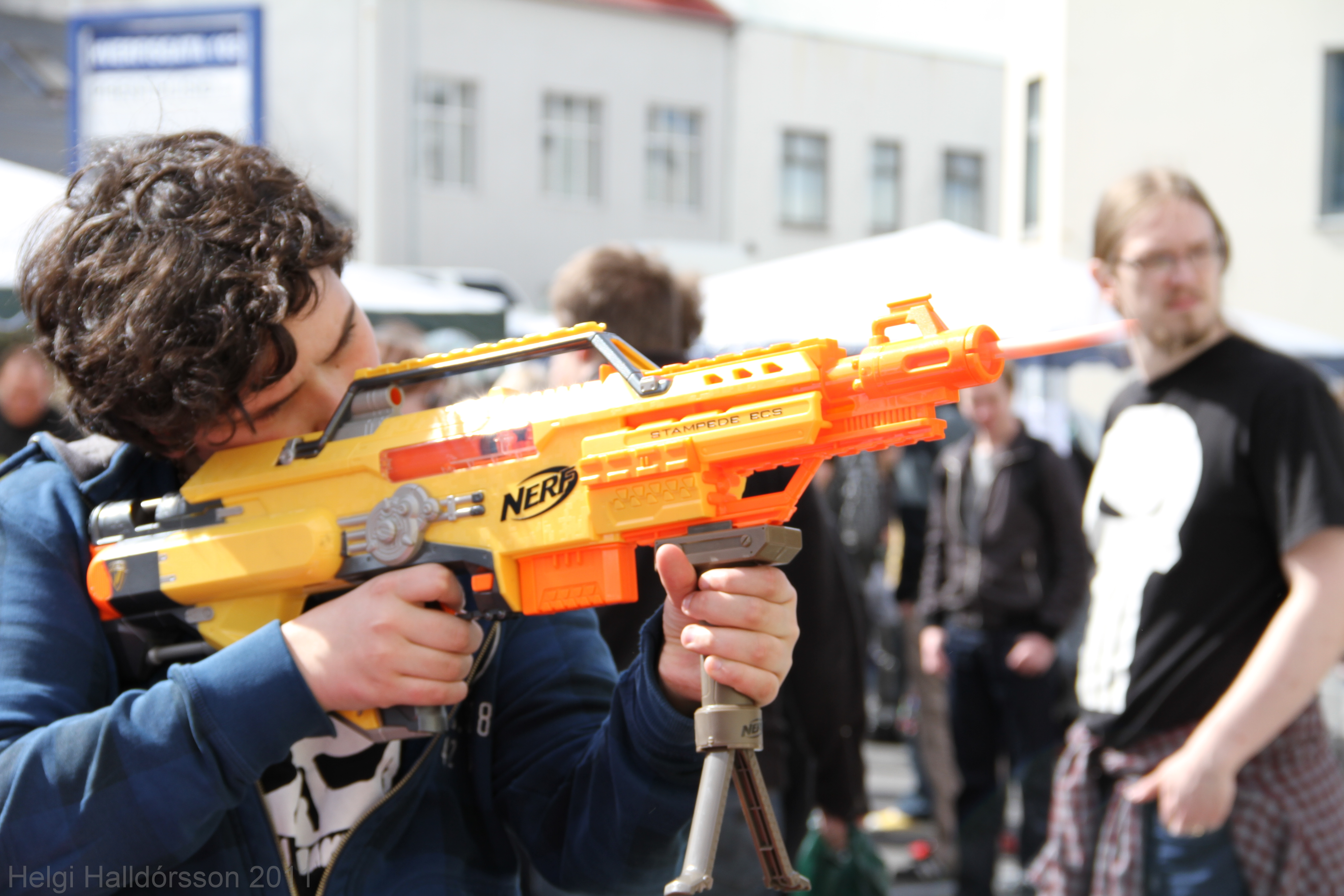 Nerf